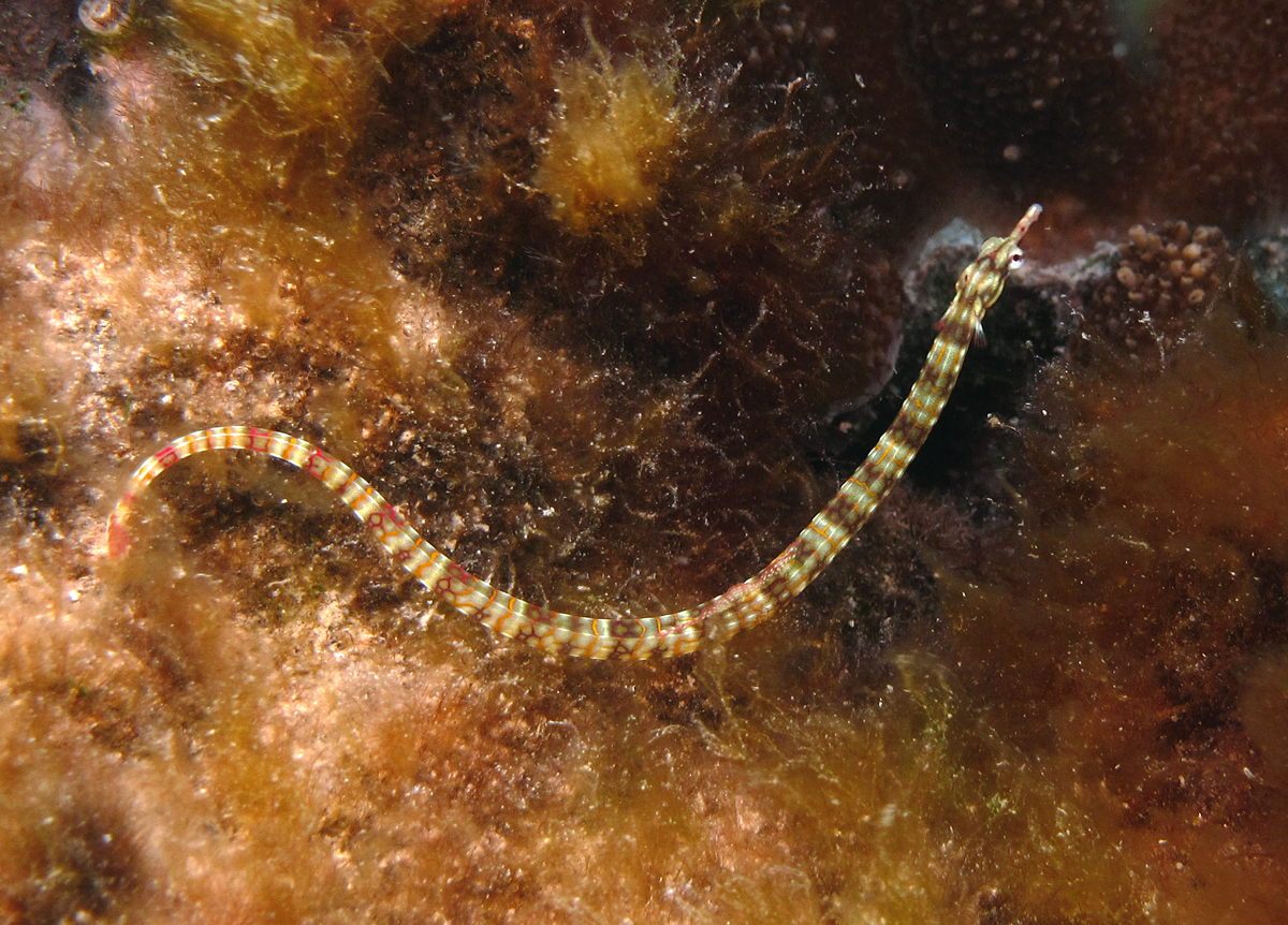 Un syngnathe à réseaux (Corythoichthys flavofasciatus) à la Réunion.